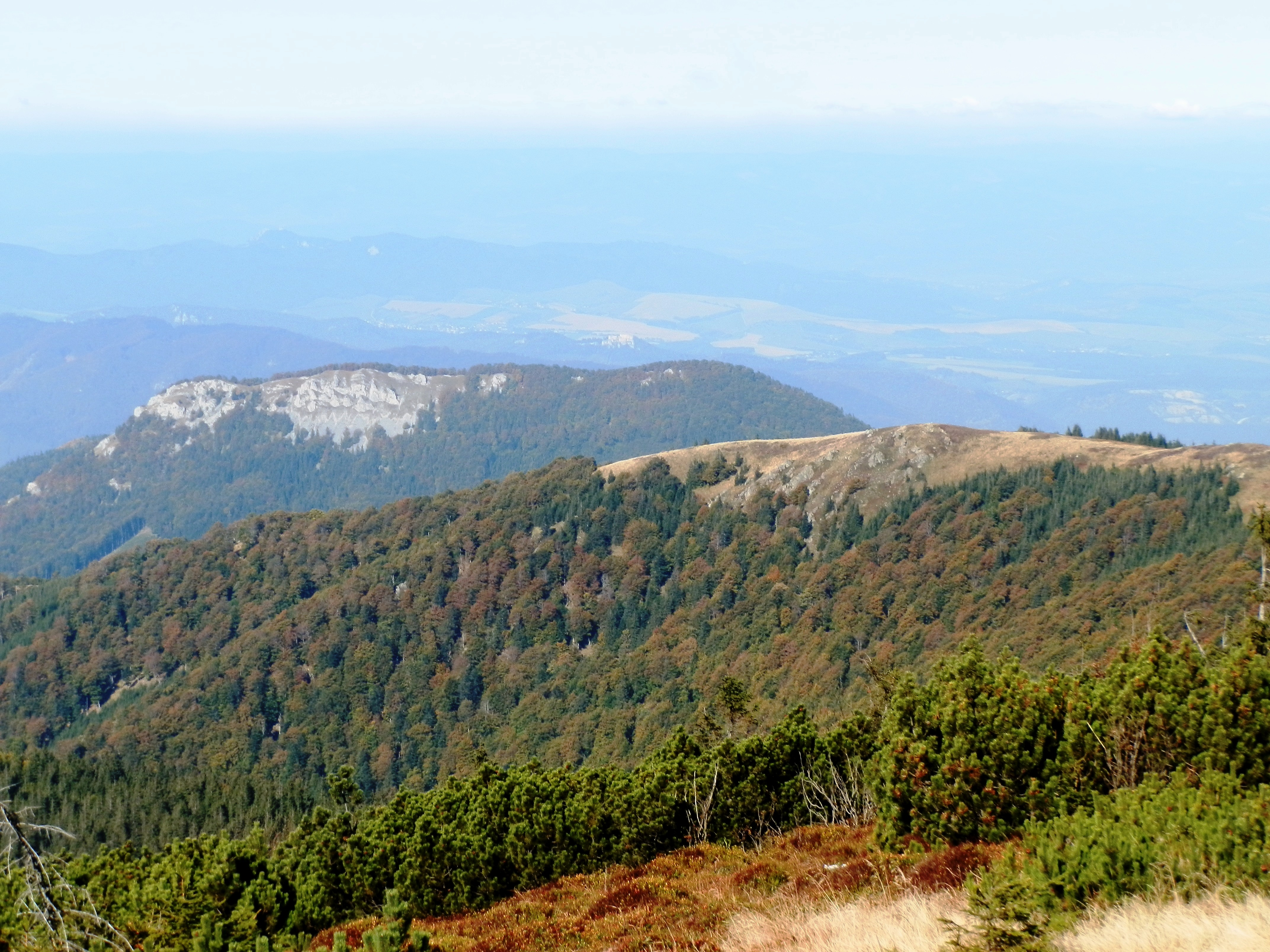 Kozol a Skalka